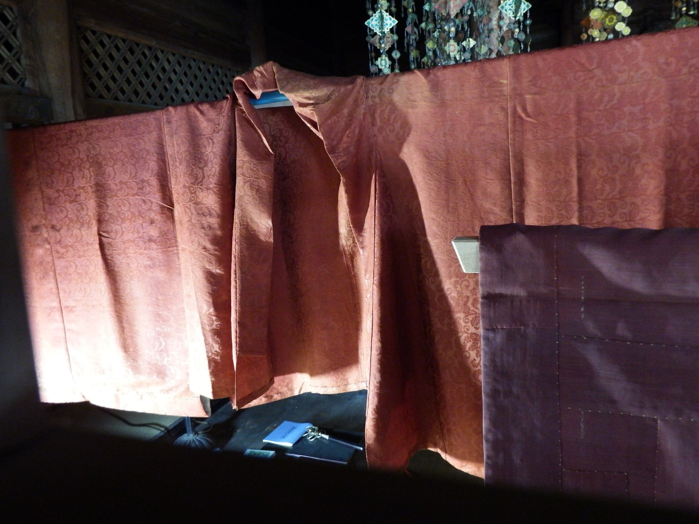 高野山奥の院大師御衣